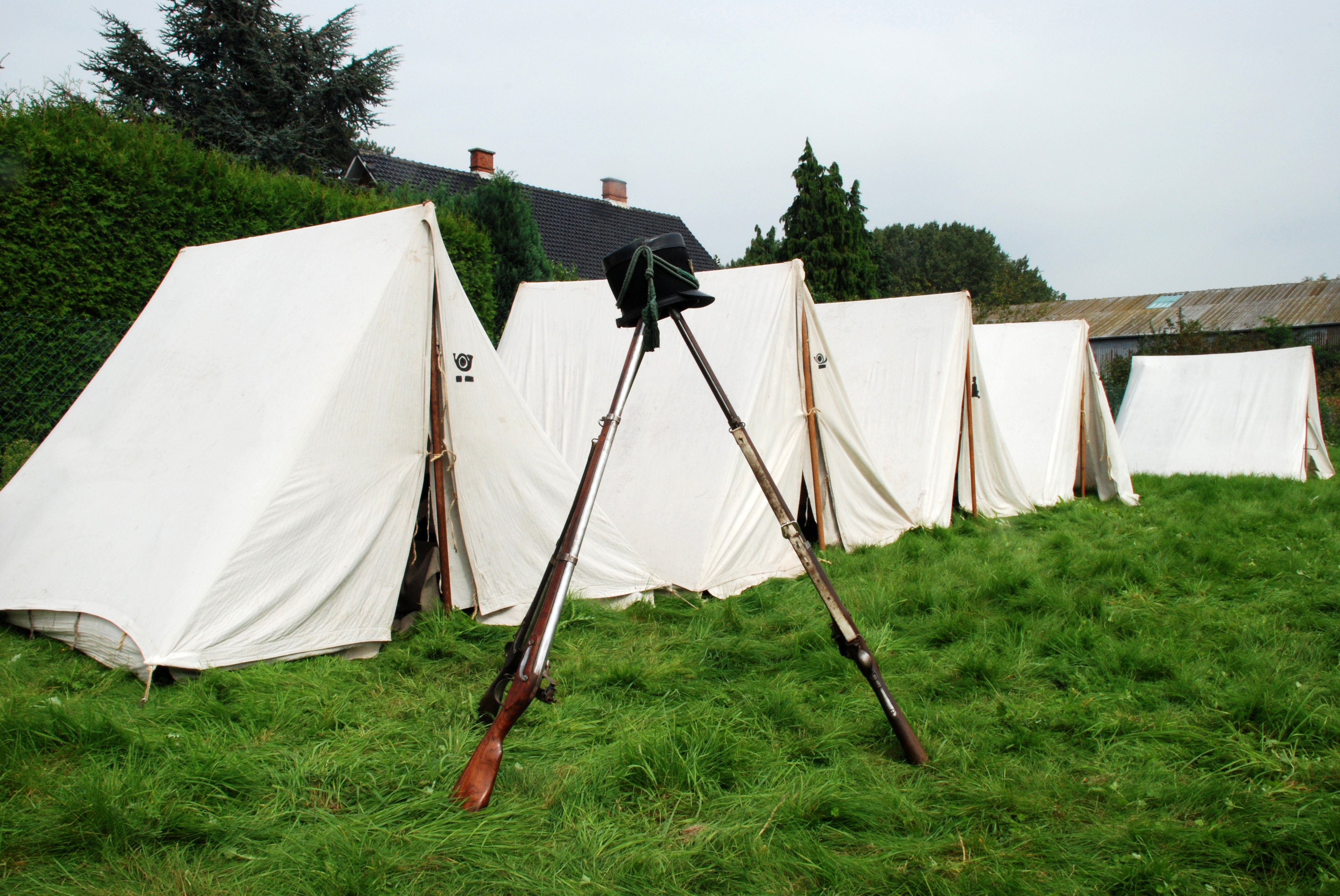 Belgique - Province de Namur - Sombreffe - Ligny - Centre général Gérard - Bivouac du 1er régiment de la Garde Impériale